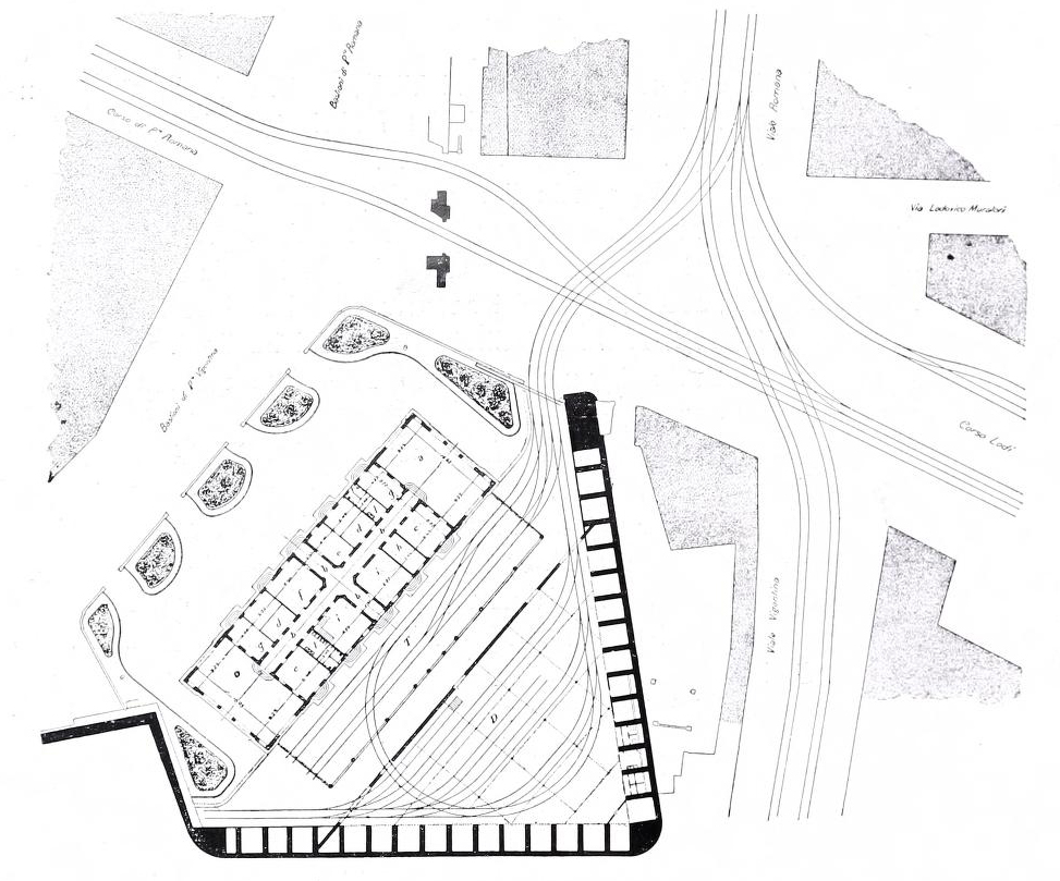 Planimetria generale della stazione funebre di Porta Romana, Milano, nel 1907, da 'L'Edilizia Moderna (1908